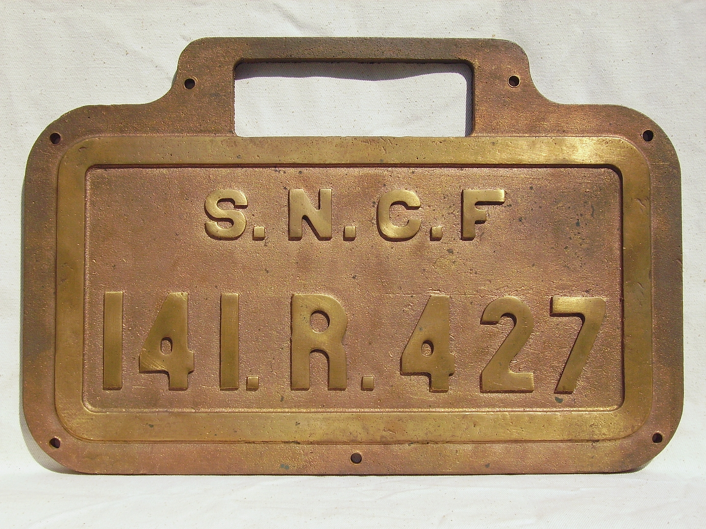 Plaque d'immatriculation de la locomotive 141 R 427.